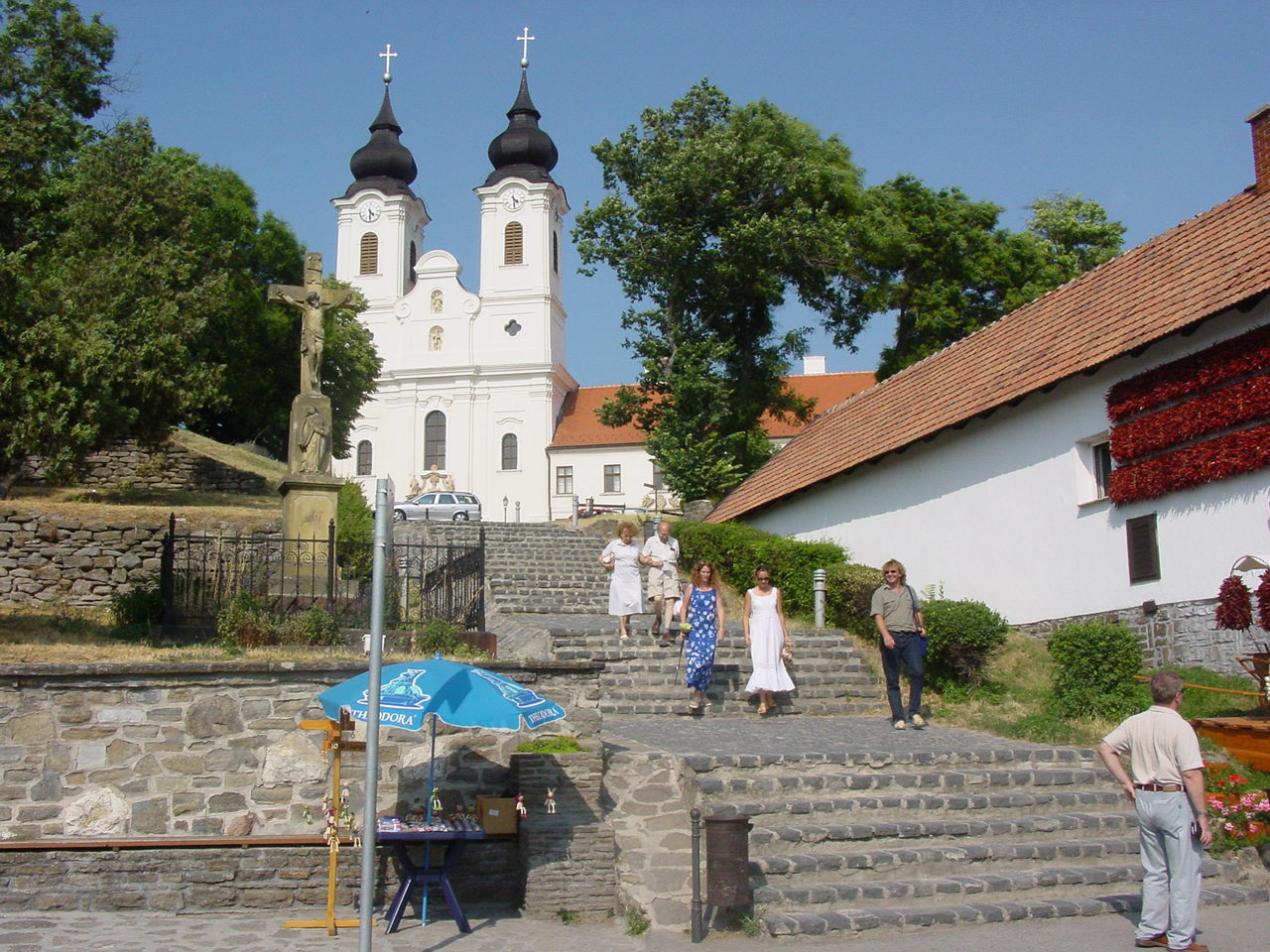 Tihany. Stako July 2003